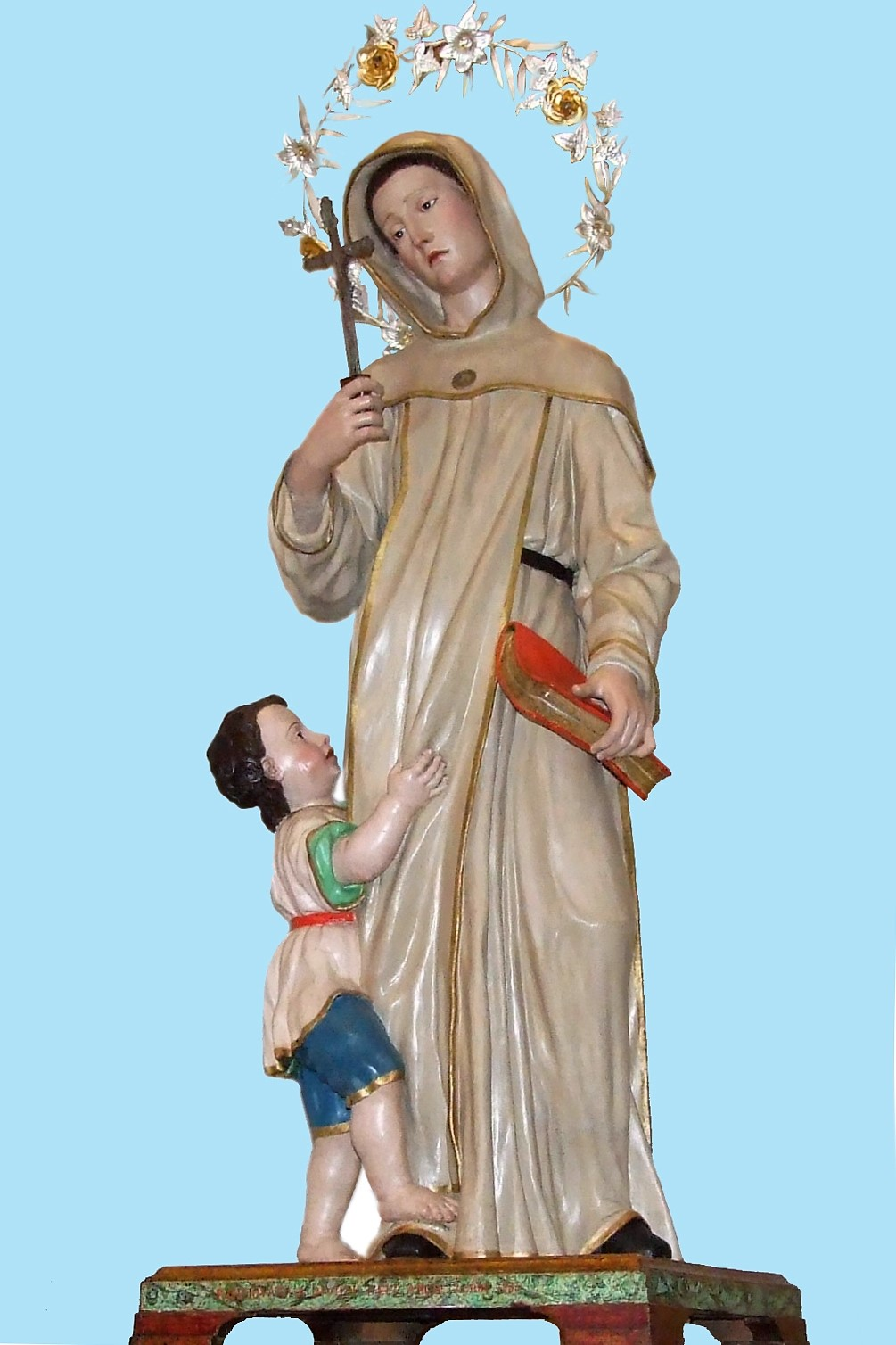 la statua è stata scolpita dallo scultore Vincenzo Zaffiro nel 1800